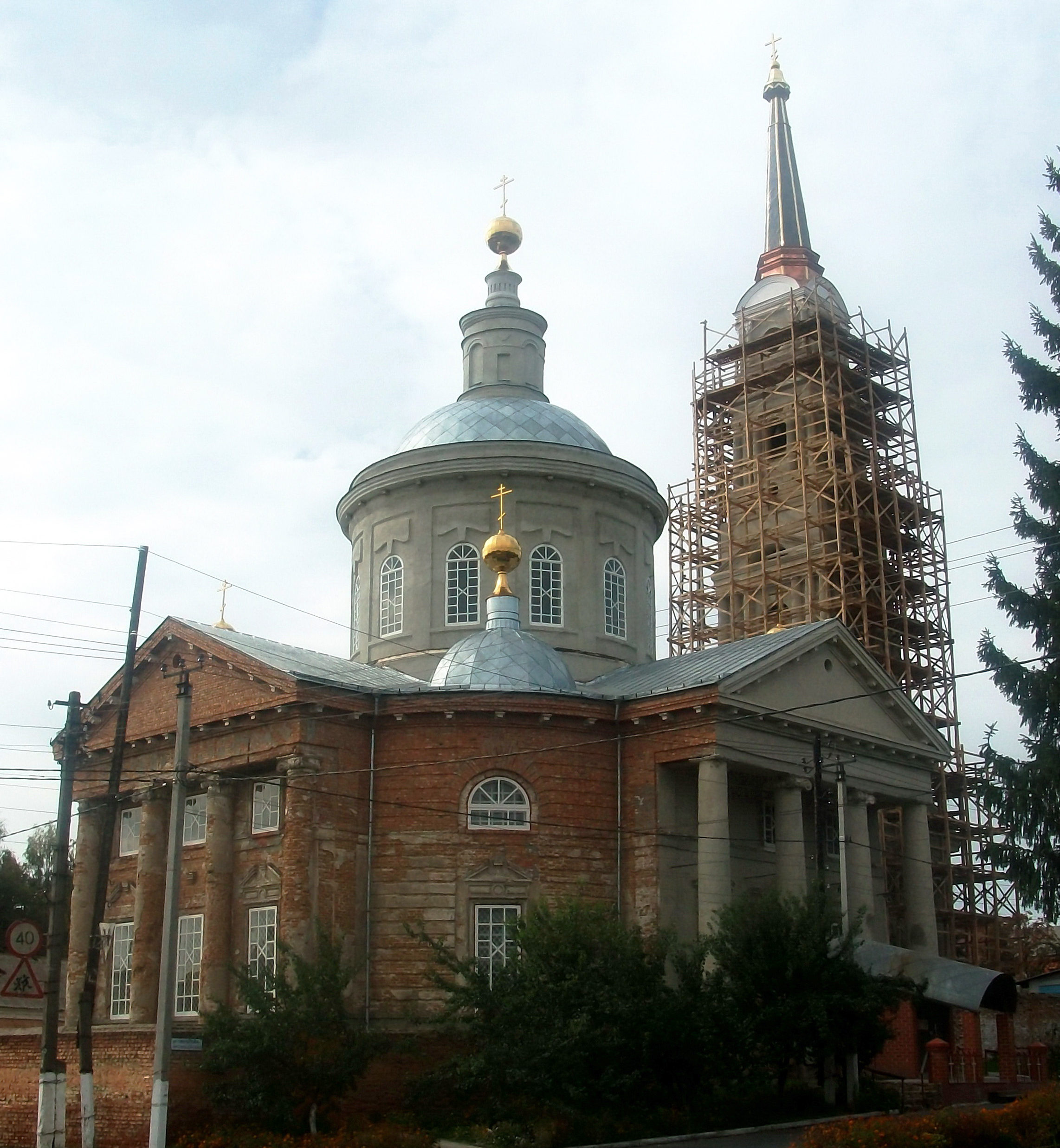 Успенскйи кафедральный собор в городе Рыльске Курской области